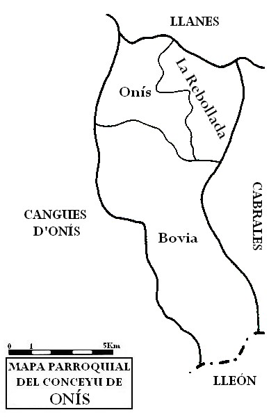 Mapa parroquial del conceyu d'Onís.